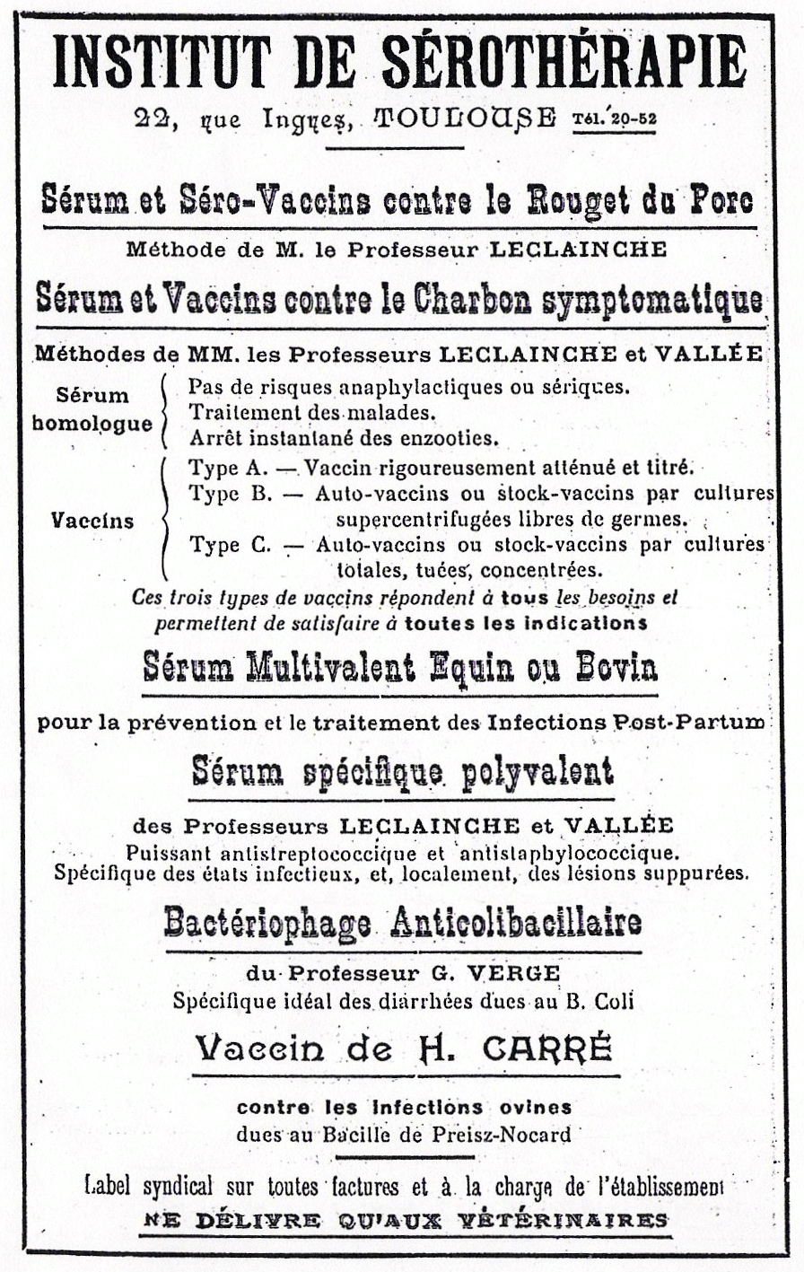 Publicité de l'Institut de Sérothérapie de Toulouse